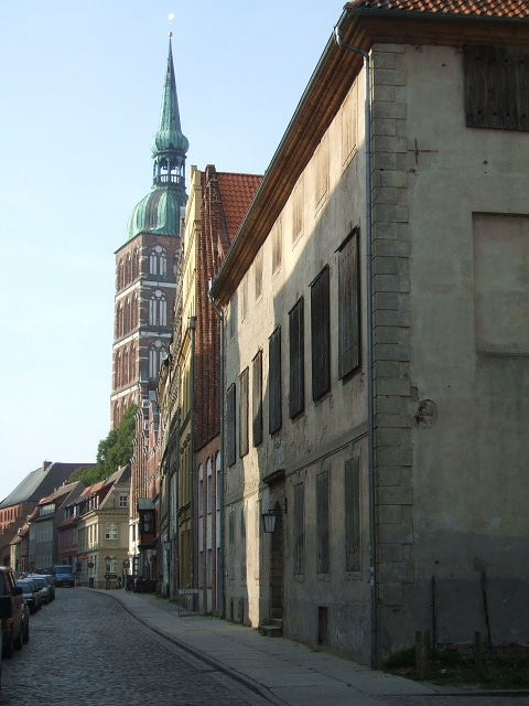 Stralsund, Germany. Das Foto zeigt eine Gedenktafel für Schwedens König Gustav Adolf.